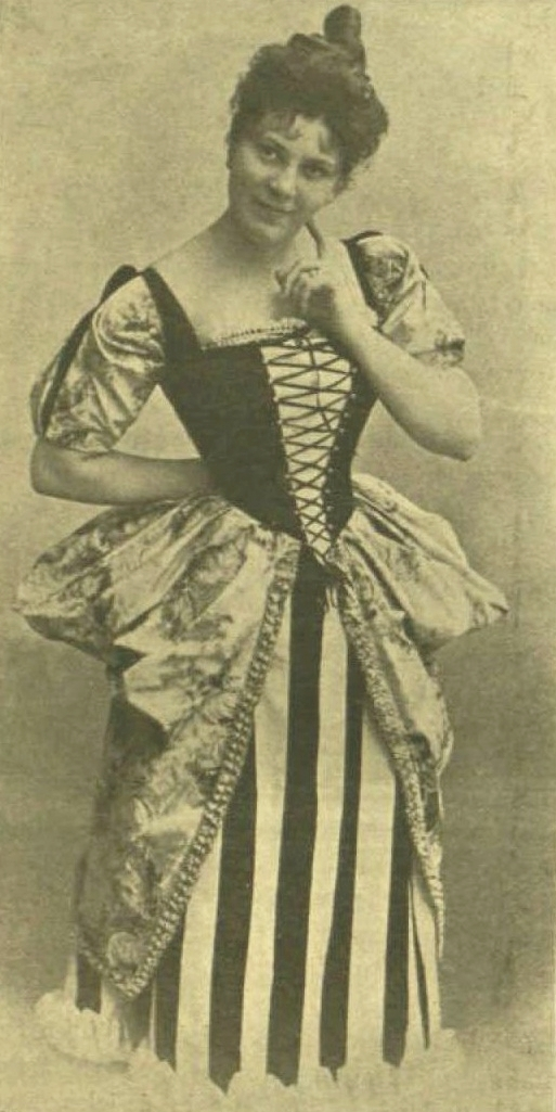 Bárdy Gabi a Vasárnapi Ujság 45. évf. 52. számában Adolphe Philippe Dennery-Paul Burani-Robert Planquette: Varázsgyűrű.